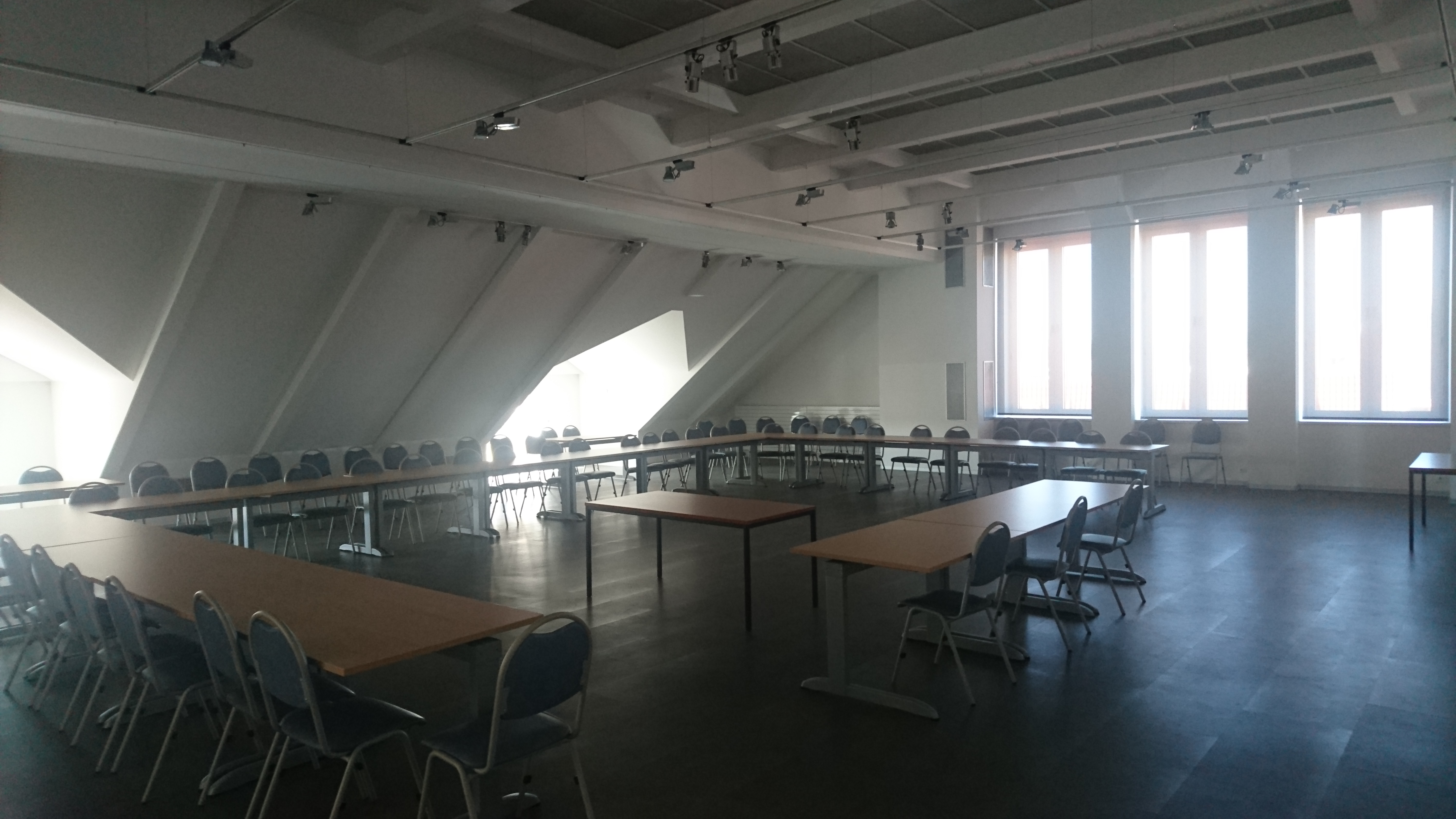 Interior of the Hall of Architects